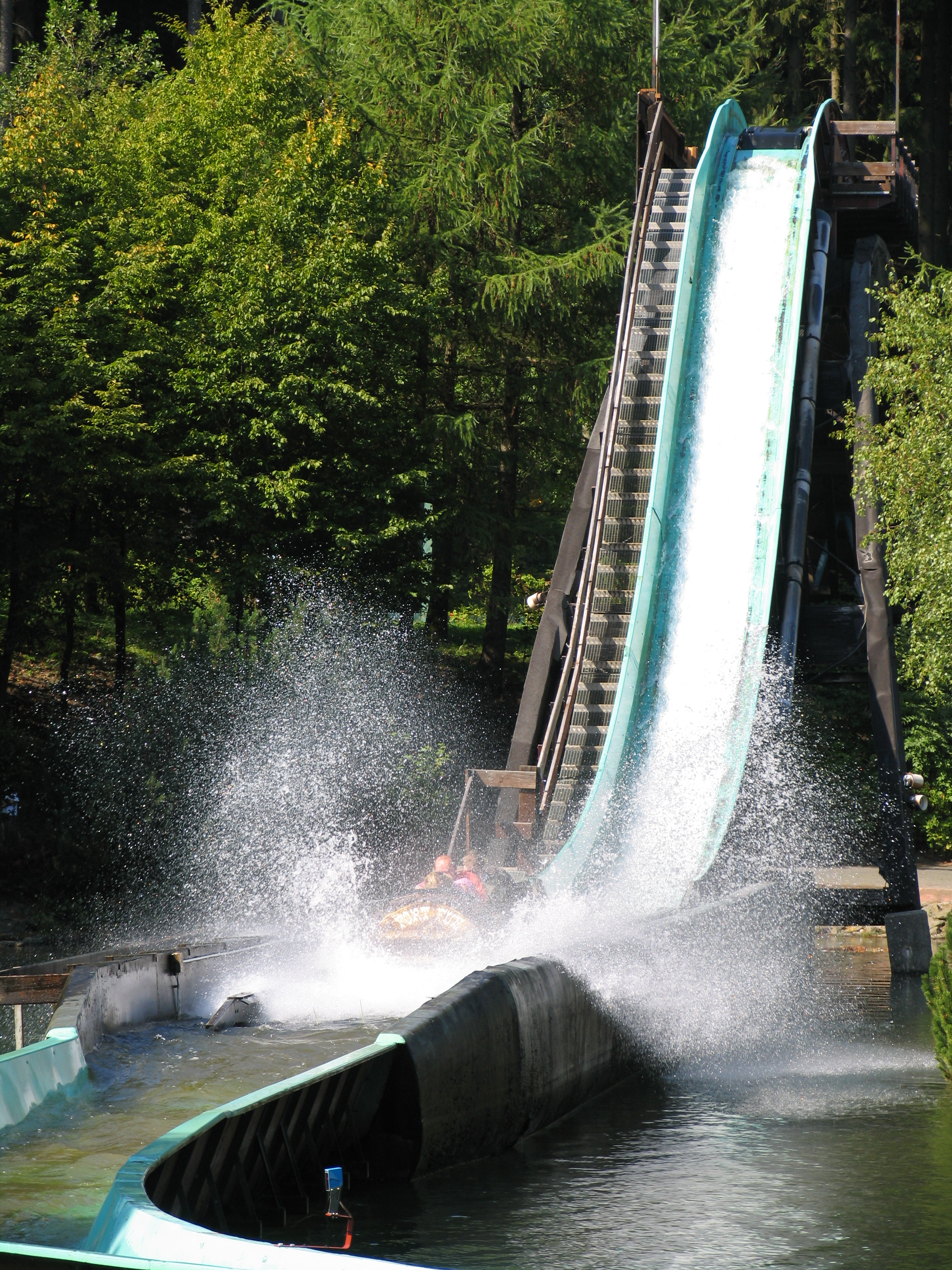 Log Flume at Fort Fun, Germany